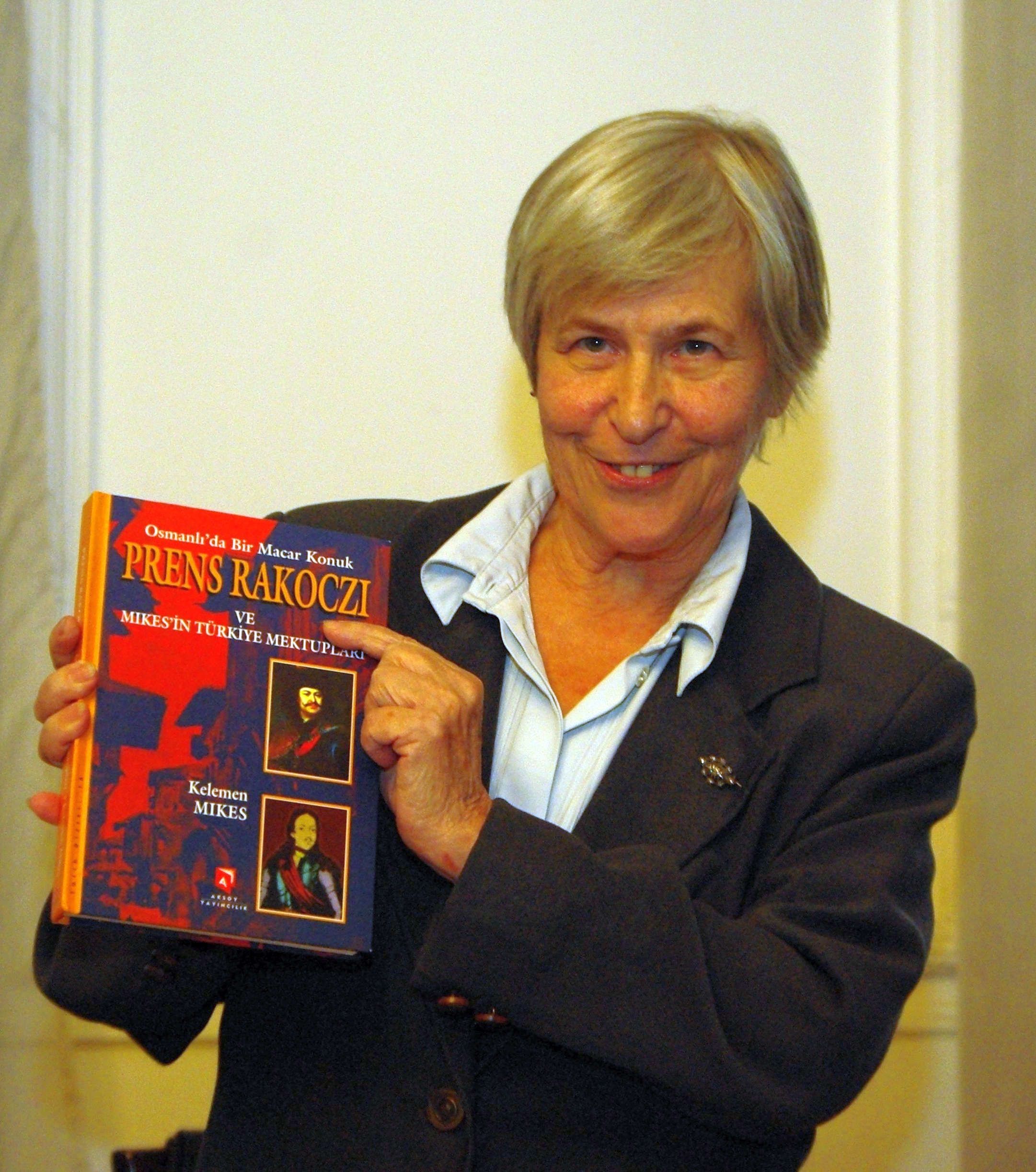 Tasnádi Edit (Budapest, 1942. november 26. –) magyar turkológus, műfordító, egyetemi oktató.